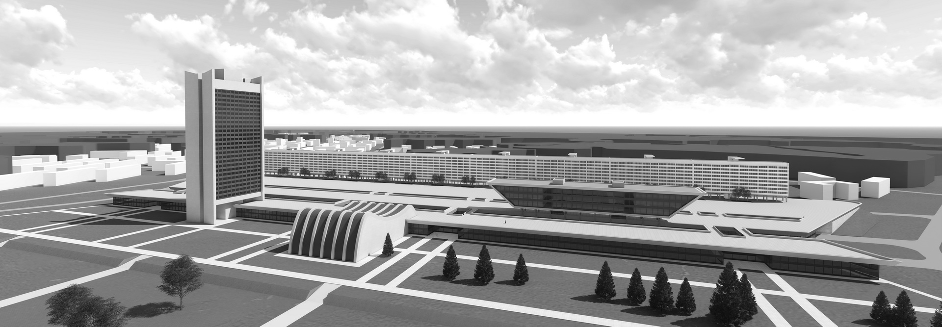 Компьютерная реконструкция